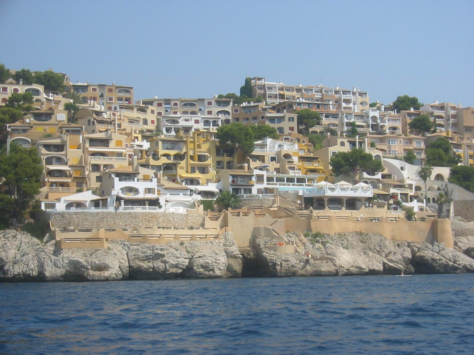 Die Siedlung Cala Fornells vom Meer aus fotographiert. Mein eigenes Bild, frei zur Verwendung bei Wikipedia.